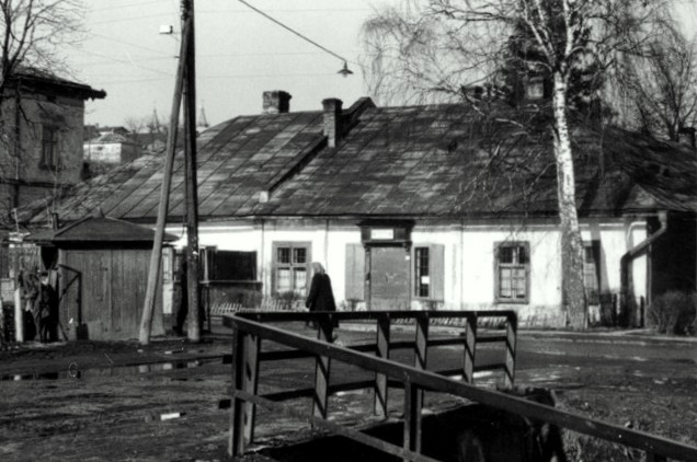 Nieistniejący dom Beksińskich przy ulicy Jagiellońskiej w Sanoku (lata 1960-1970)